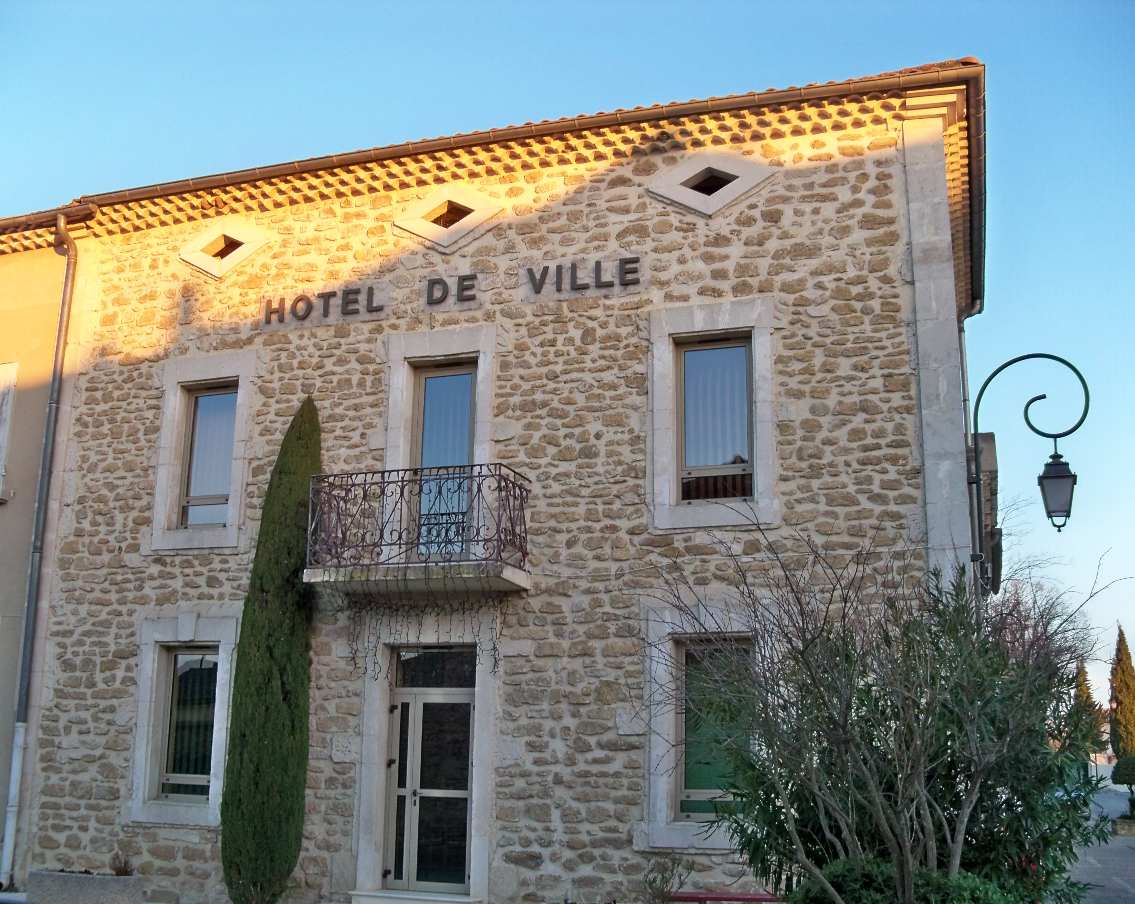 Mairie de Richerenches, Vaucluse, France